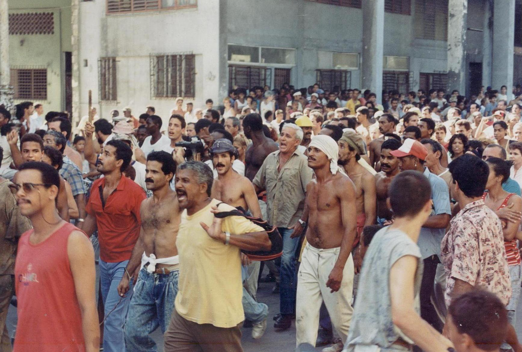 Maleconazo '94